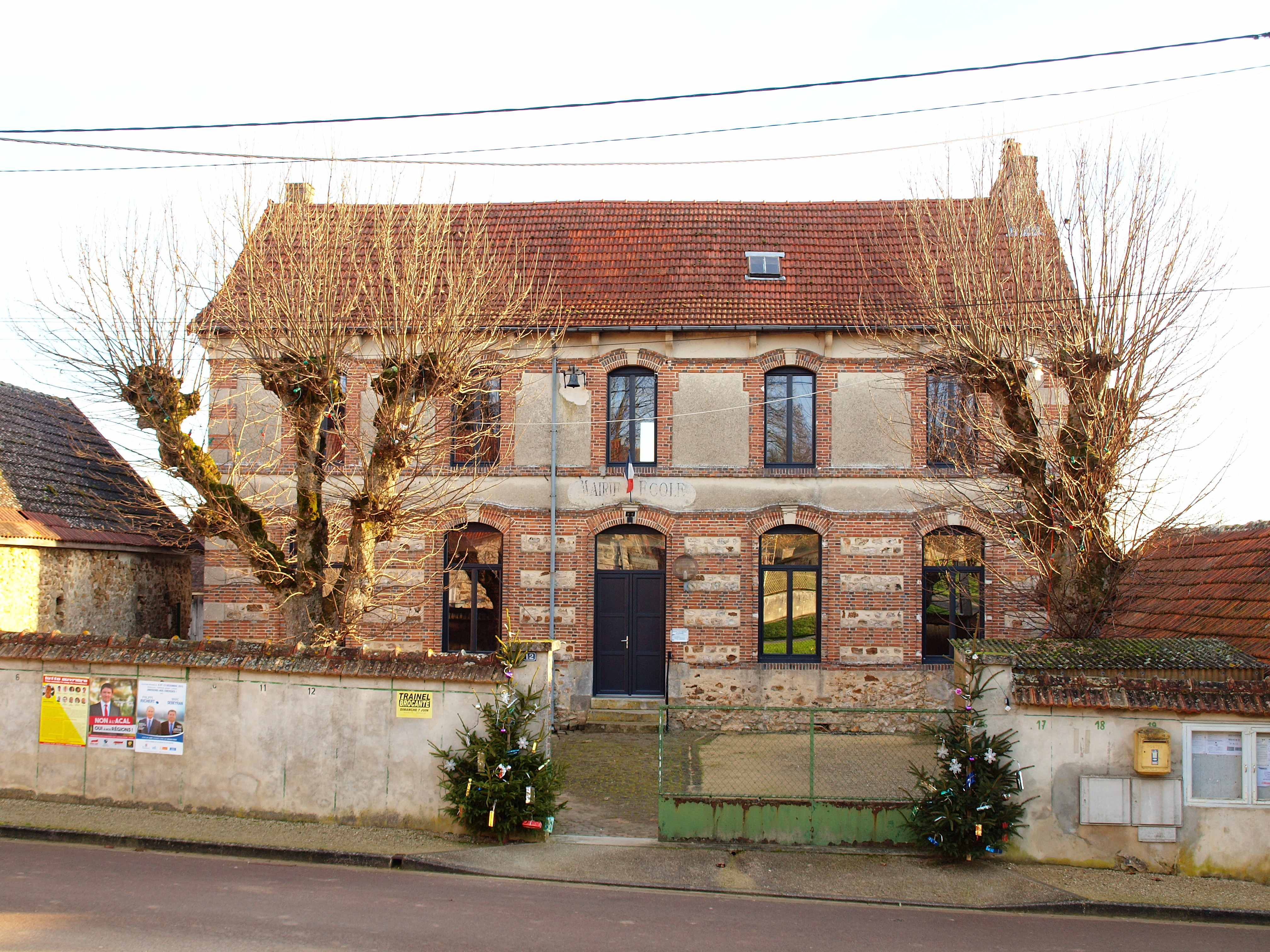 Plessis-Barbuise (Aube, France)